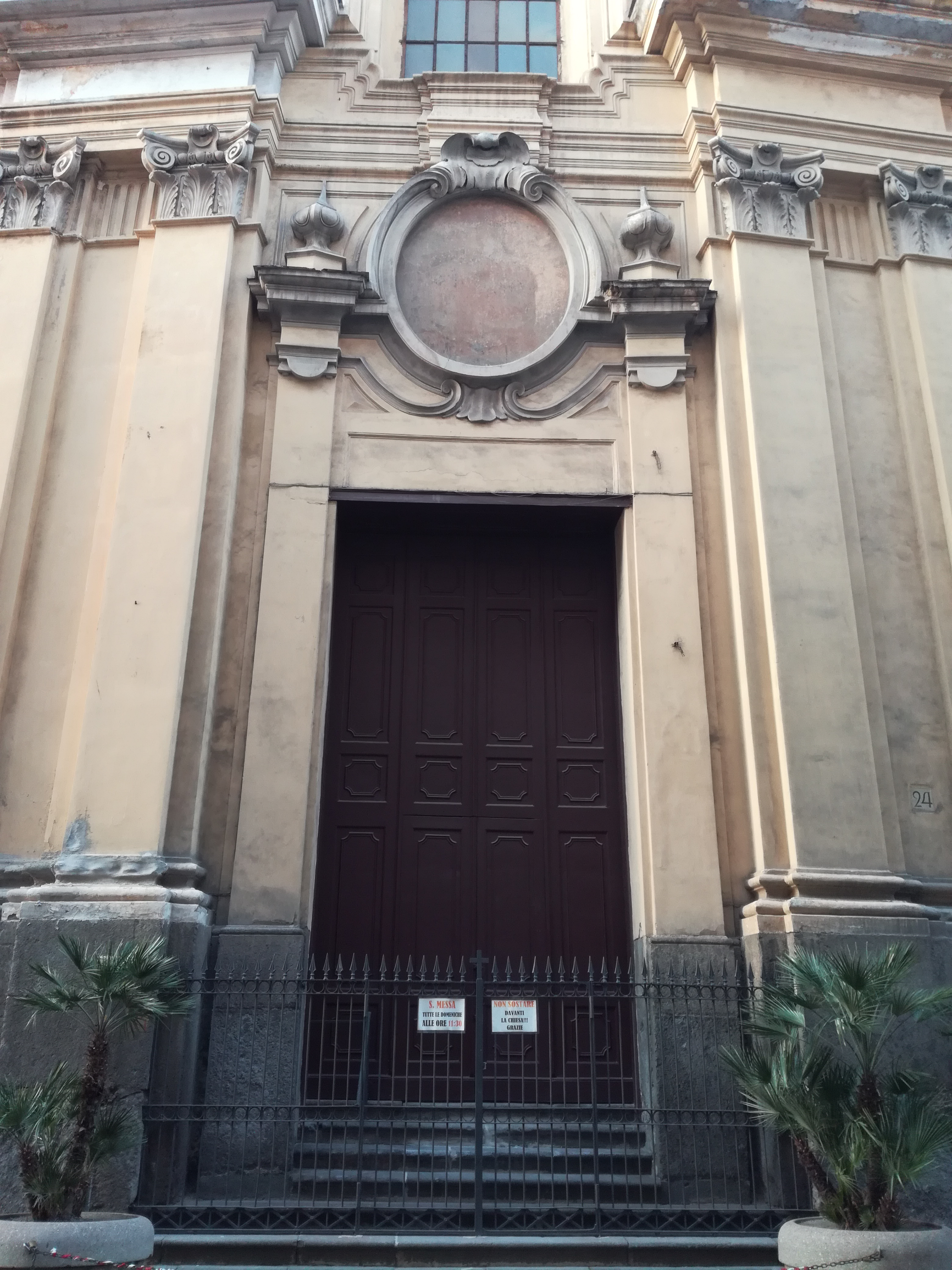 Napoli, chiesa delle Crocelle al Chiatamone: il portale